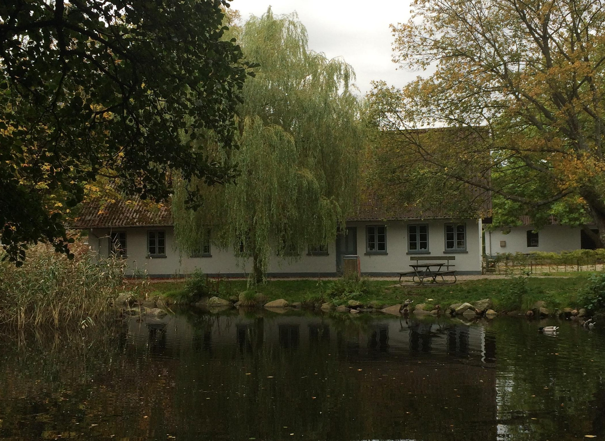 Hadsund Egnssamling set fra Rosendalssøen.